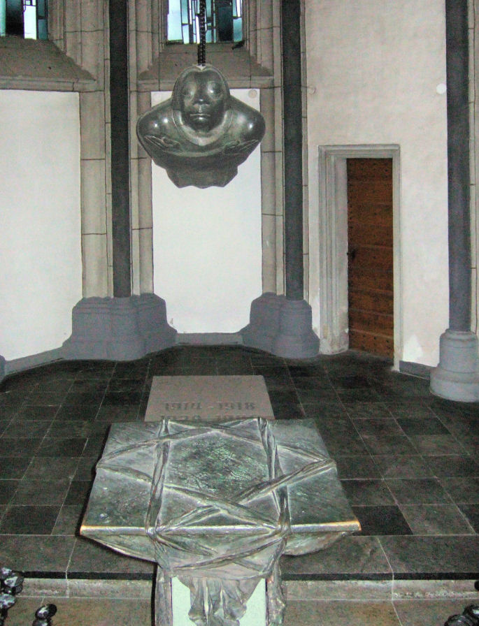 Das Lesepult unter dem Schwebenden Engel von Ernst Barlach in der Kölner Antoniterkirche ist mit einem Sechsstern aus zwei ineinander verwobenen Dreiecken verziert.